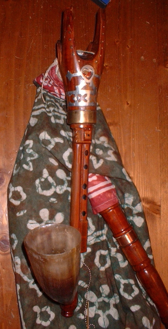 Duda, hungarian bagpipe